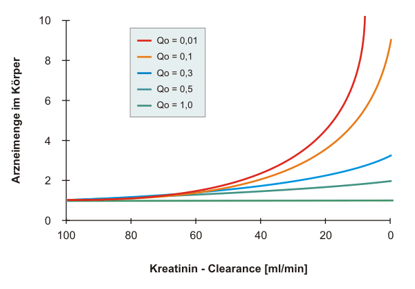 Zusammenhanng von Kreatinin-Clearance und der Menge eines Arzneistoffes im Körper